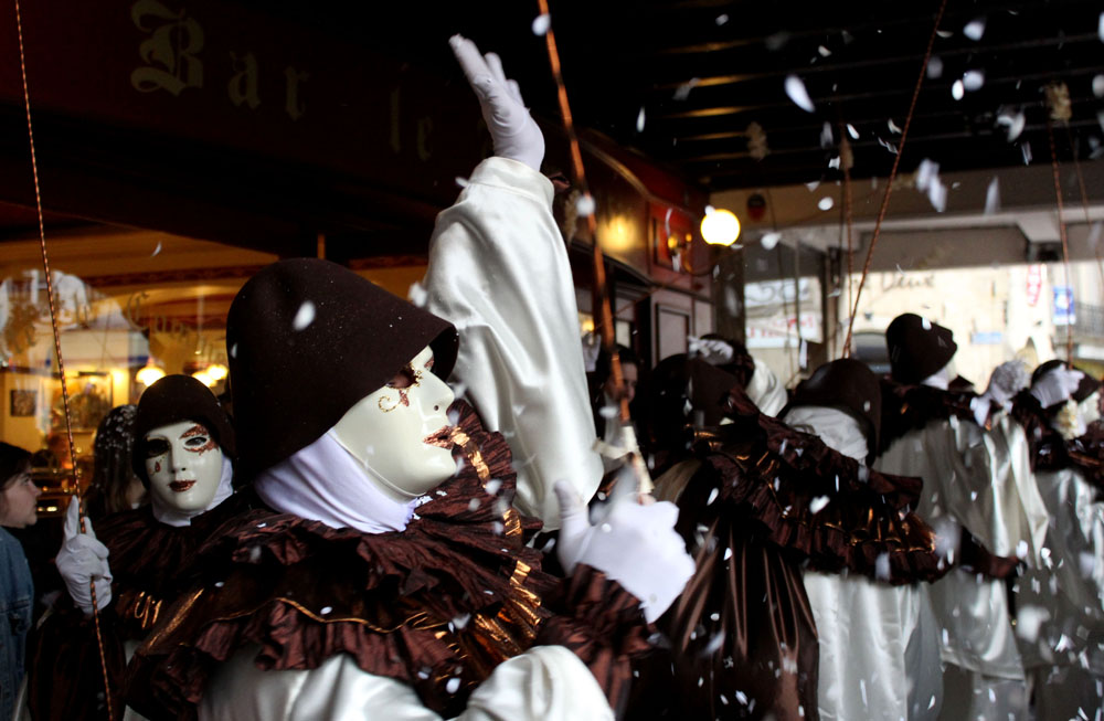 Precedissent la musica, las bandas sortisson a l’ocasion de la jornada que lor es reservada, e van aital d’un cafè cap a l’autre.